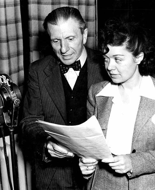 Hector Charland et Estelle Mauffette lors de l’enregistrement d’un épisode d’Un homme et son péché à la CBC